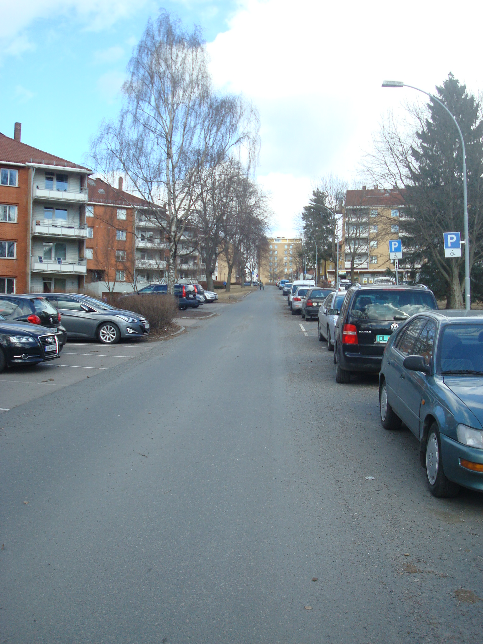 St. Jørgens vei i Oslo.